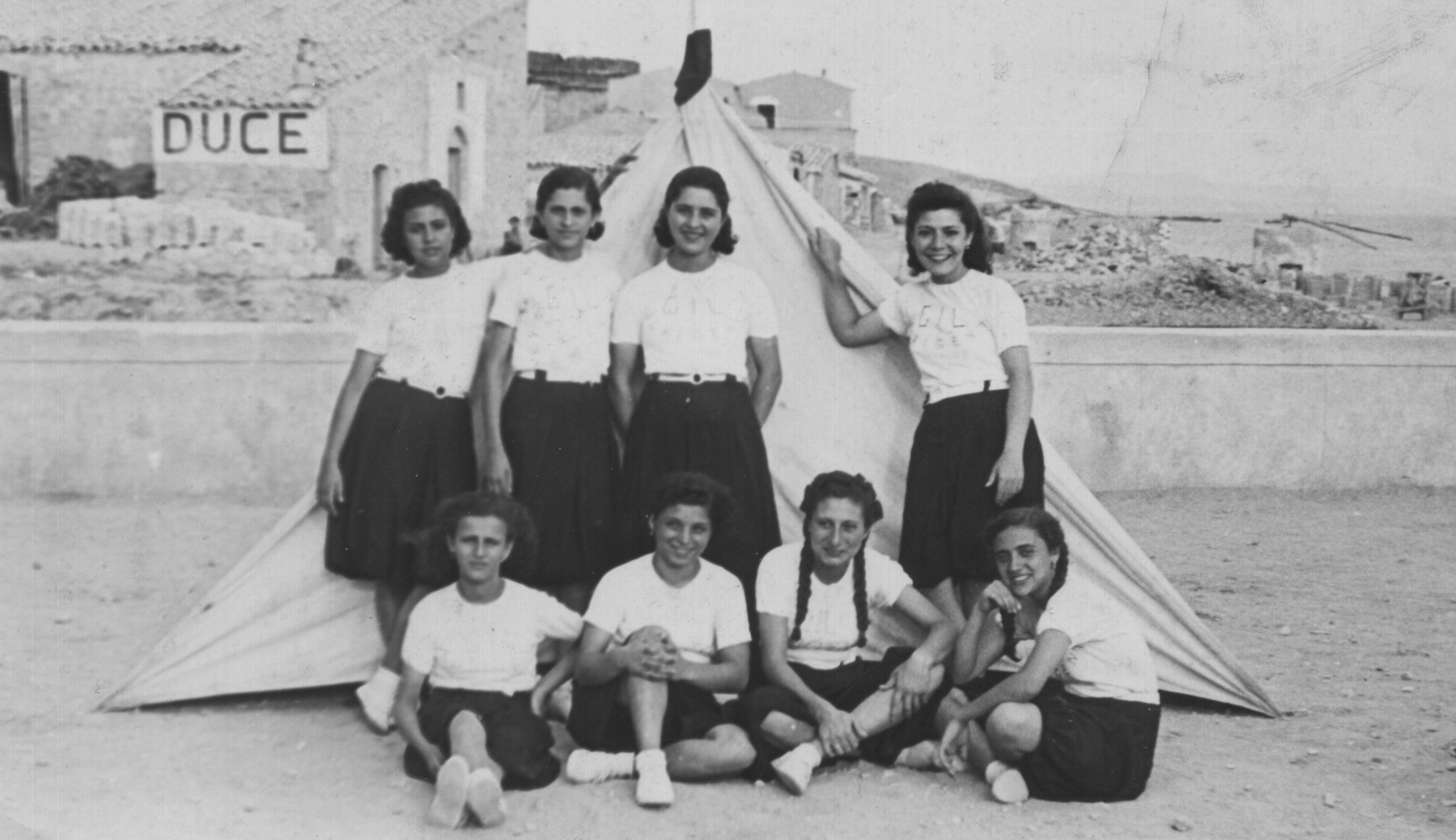 Gruppo di Piccole Italiane della GIL (Gioventù Italiana del Littorio)